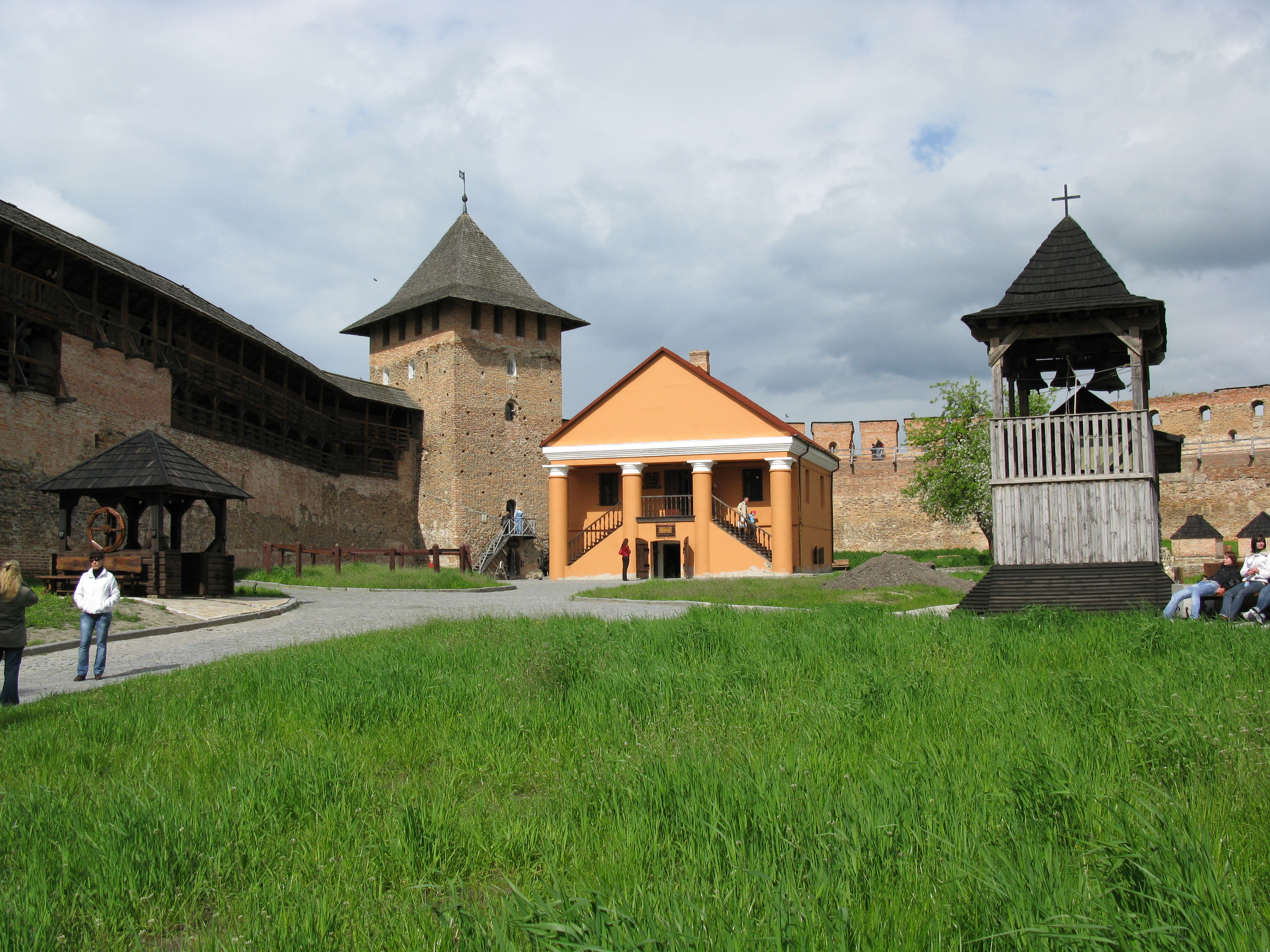 Луцький замок. Внутрішній двір.